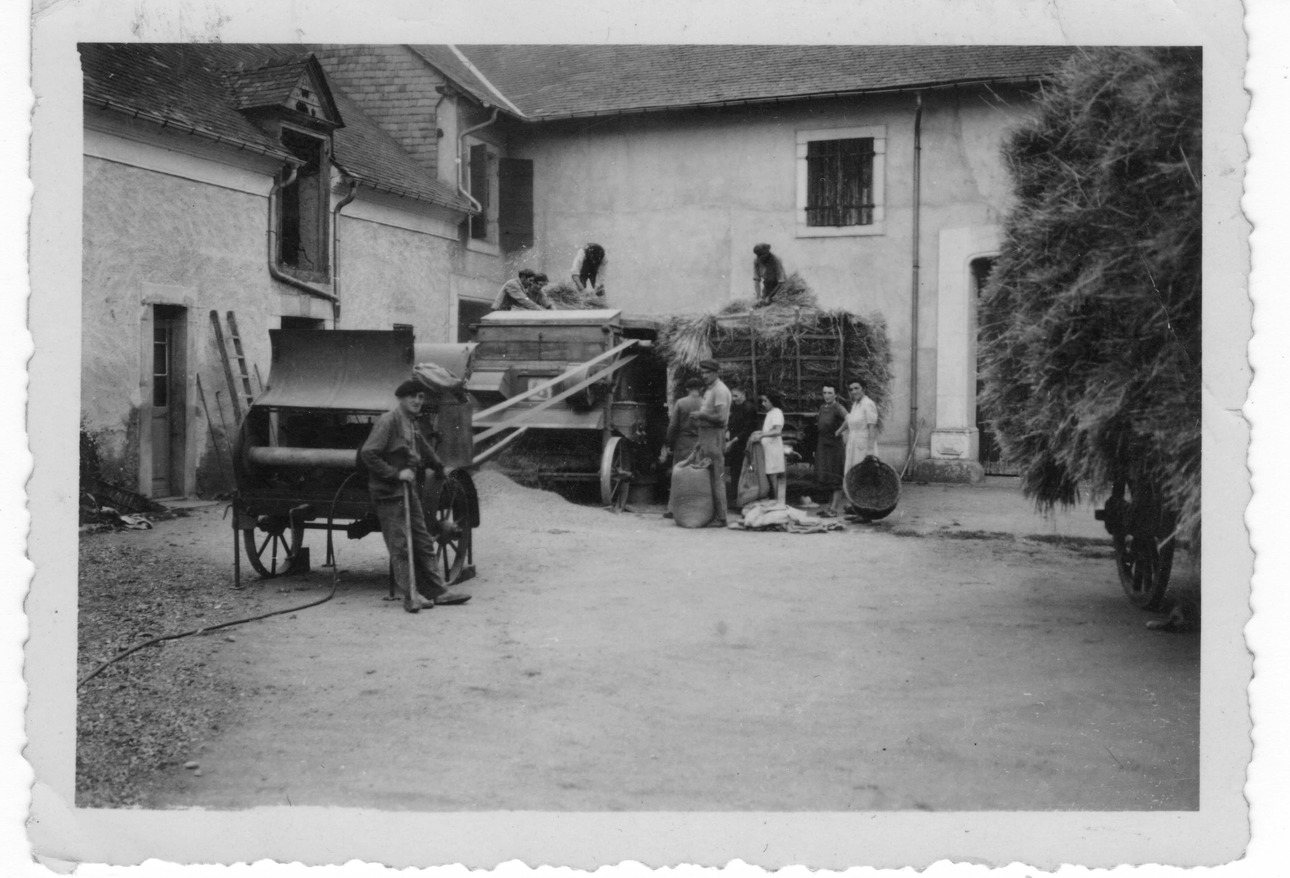 Lézignan (Hautes-Pyrénées, France) - Scene de Battage chez Camps.